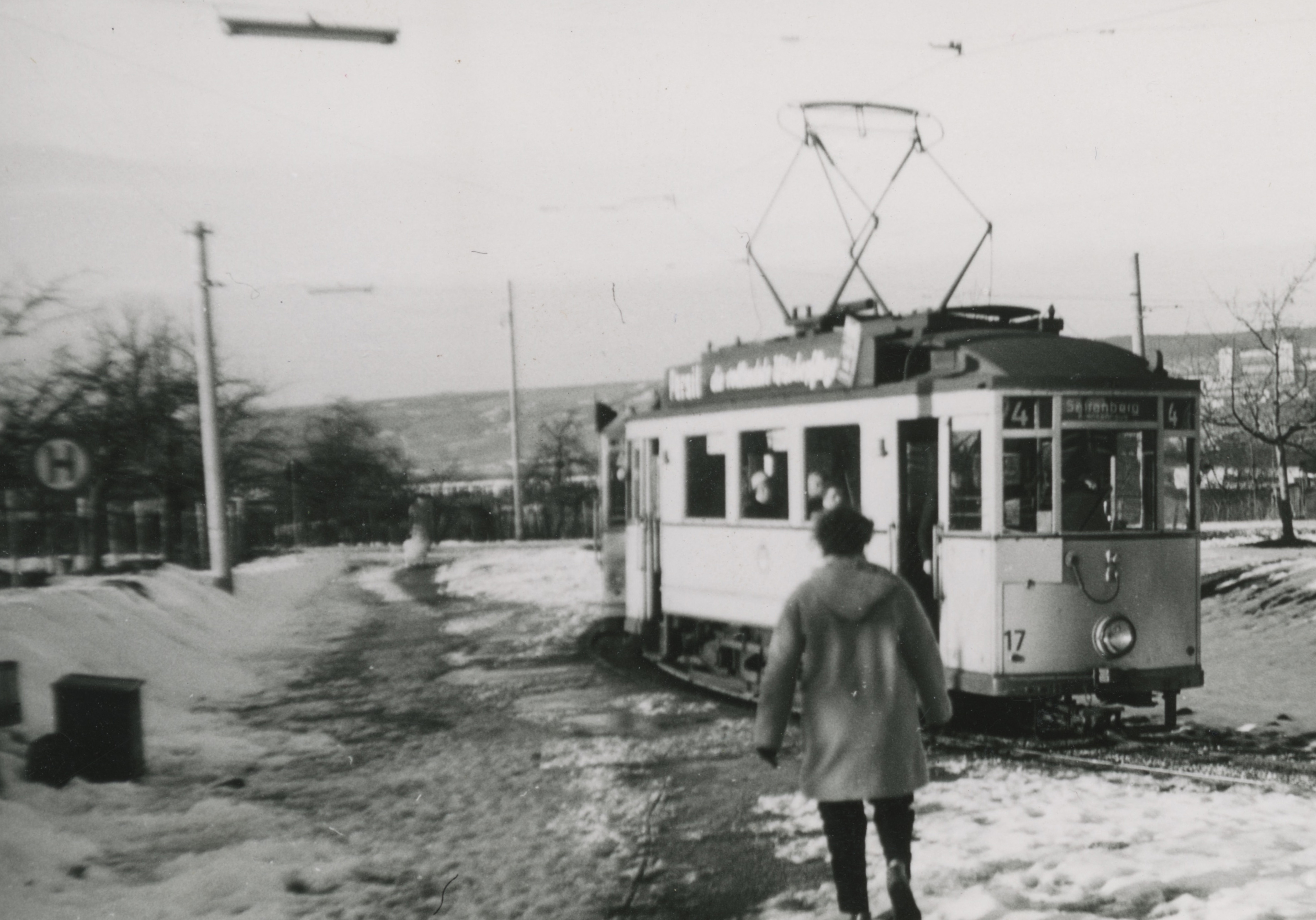 Bahn der Linie 4 auf dem Kuhberg